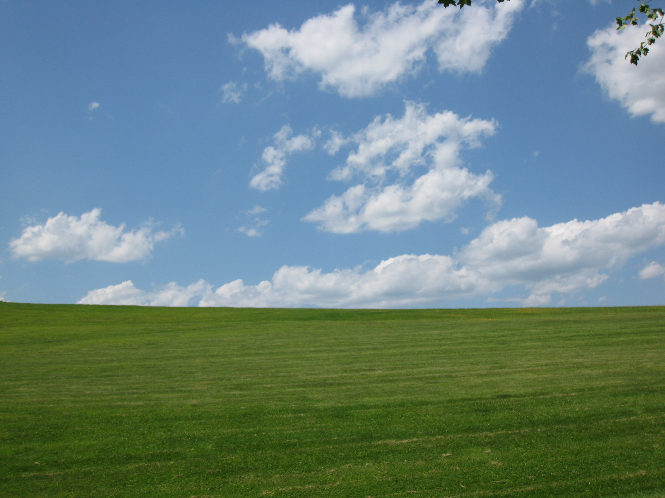 White Oak Park Looks and feels like Windows XP desktop background screen